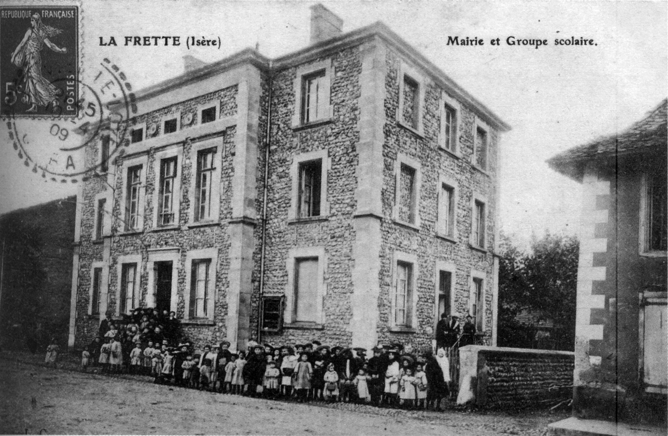 La Frette (Isère), mairie et groupe scolaire en 1909